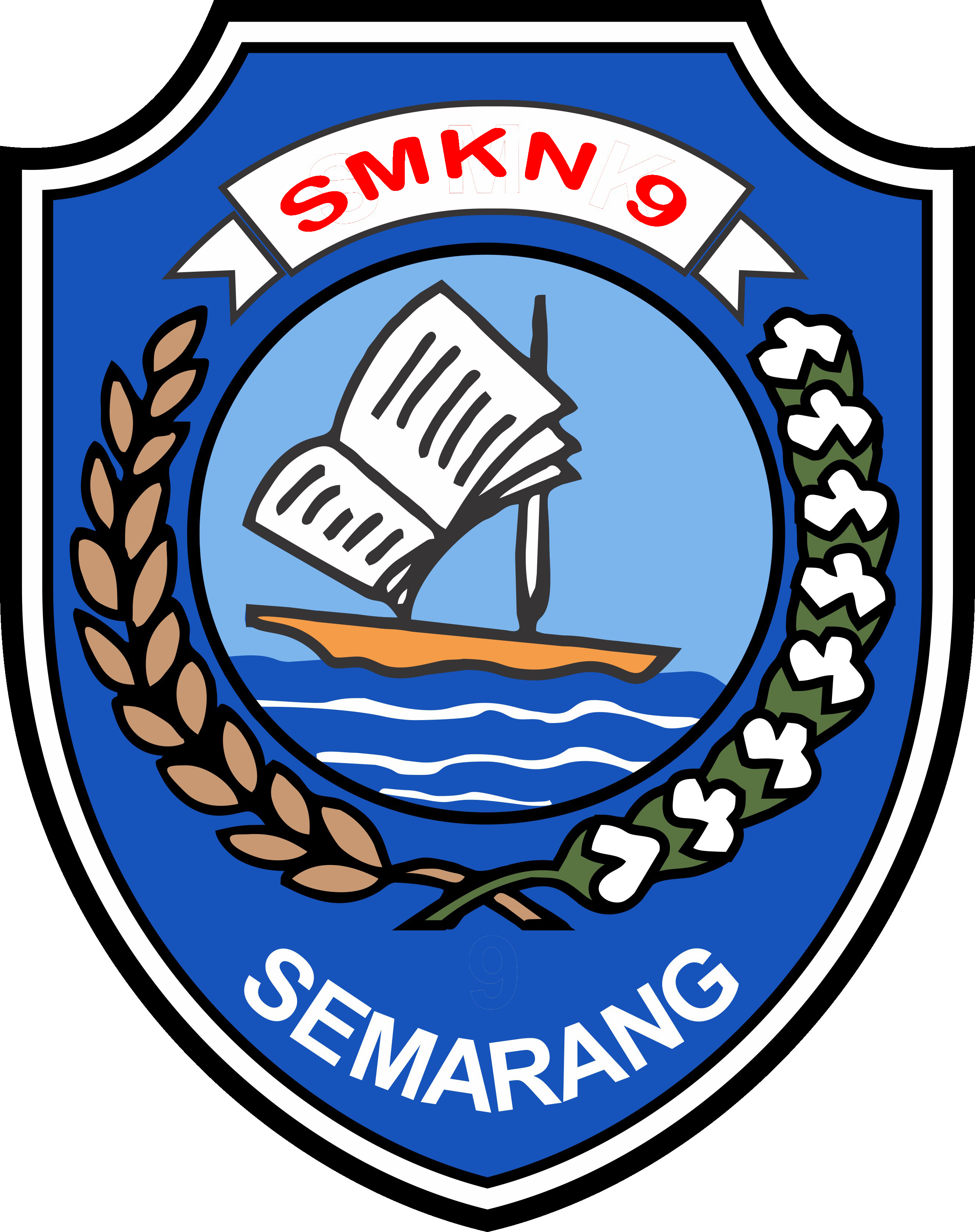 Logo baru SMK Negeri 9 Semarang per 2017